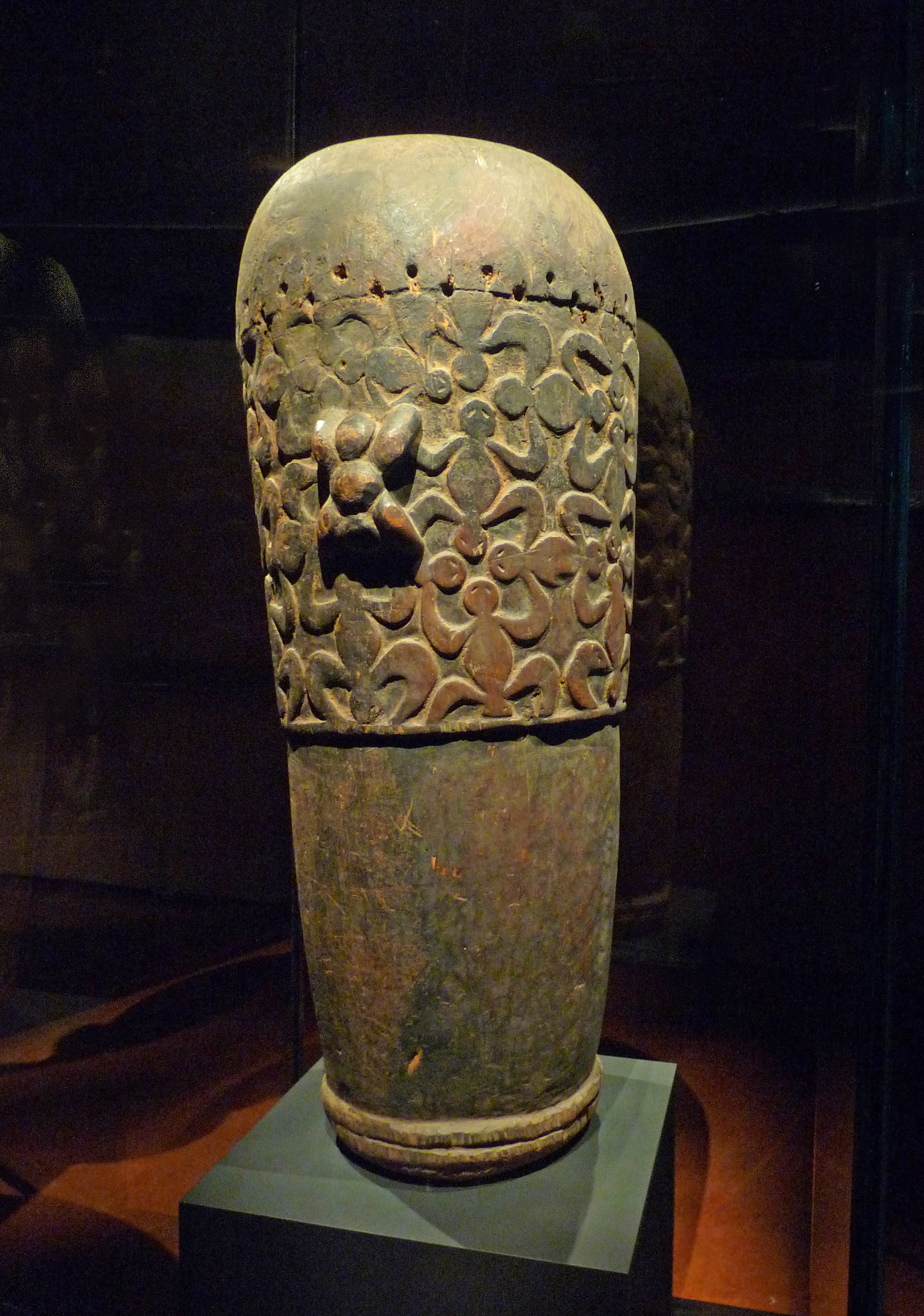 Tambour fom, population Babanki, Grasslands, Cameroun. Musée du quai Branly.